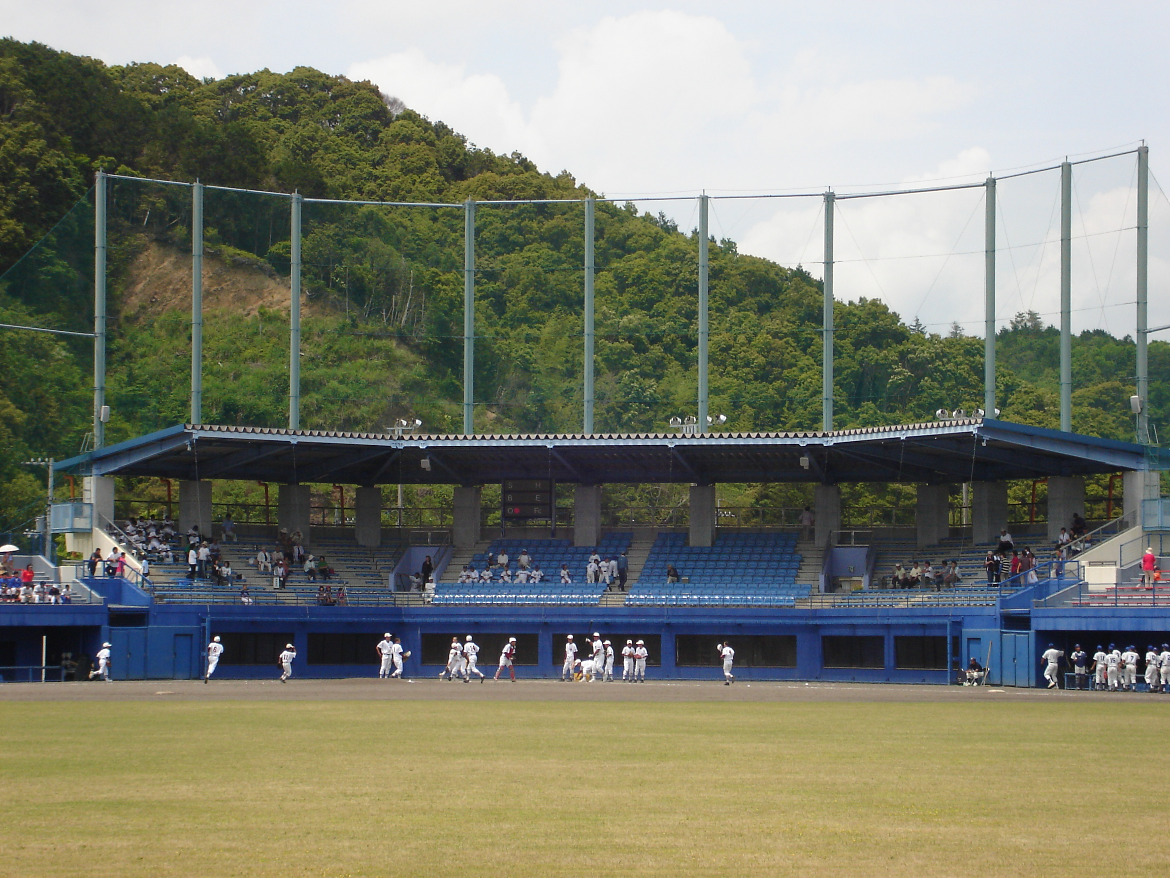 四万十市安並運動公園野球場。 - 日本国高知県四万十市にある野球場。